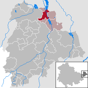 Treben in Thuringia - District Altenburger Land